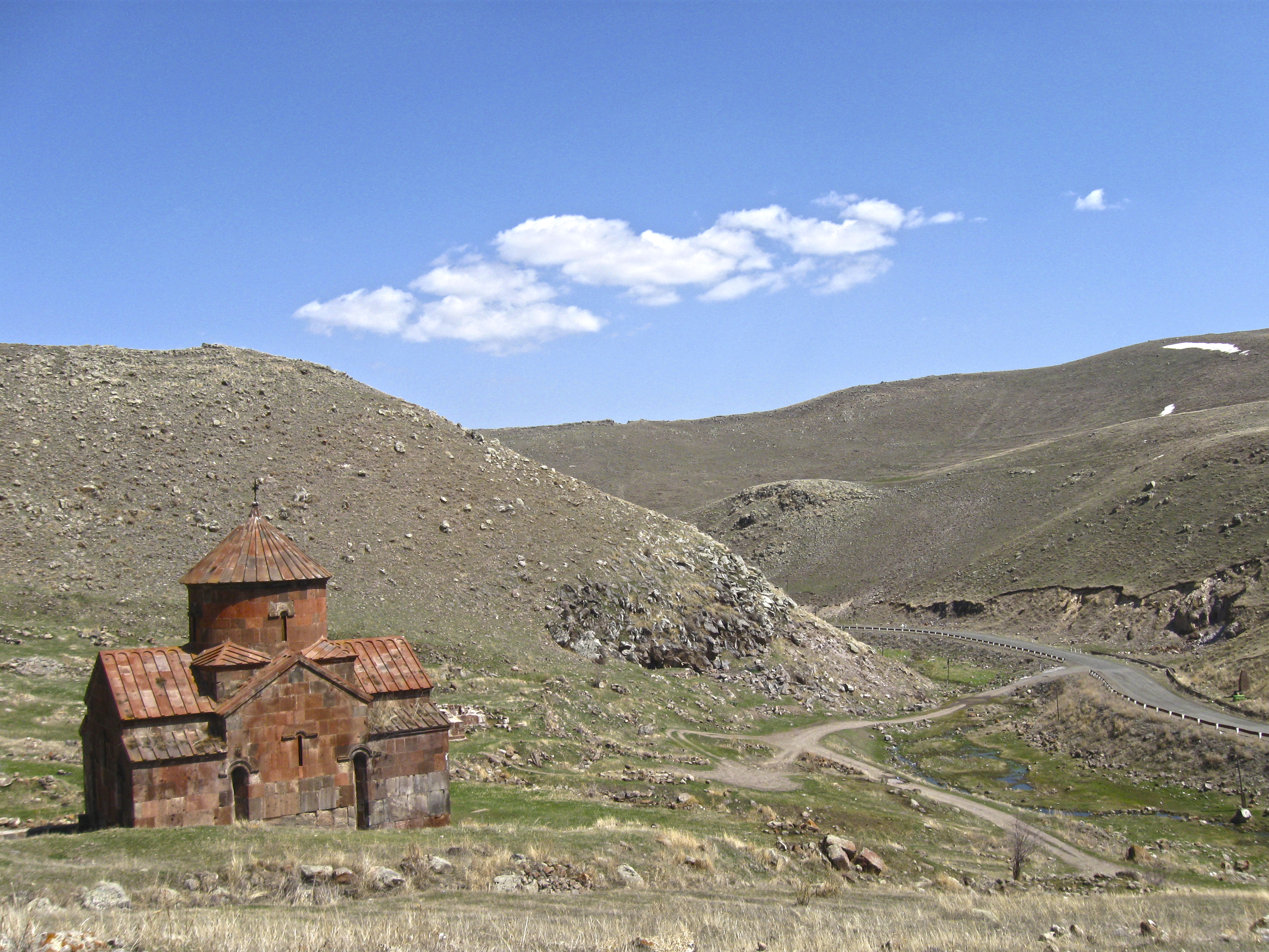 Hogevank. 100/42.1